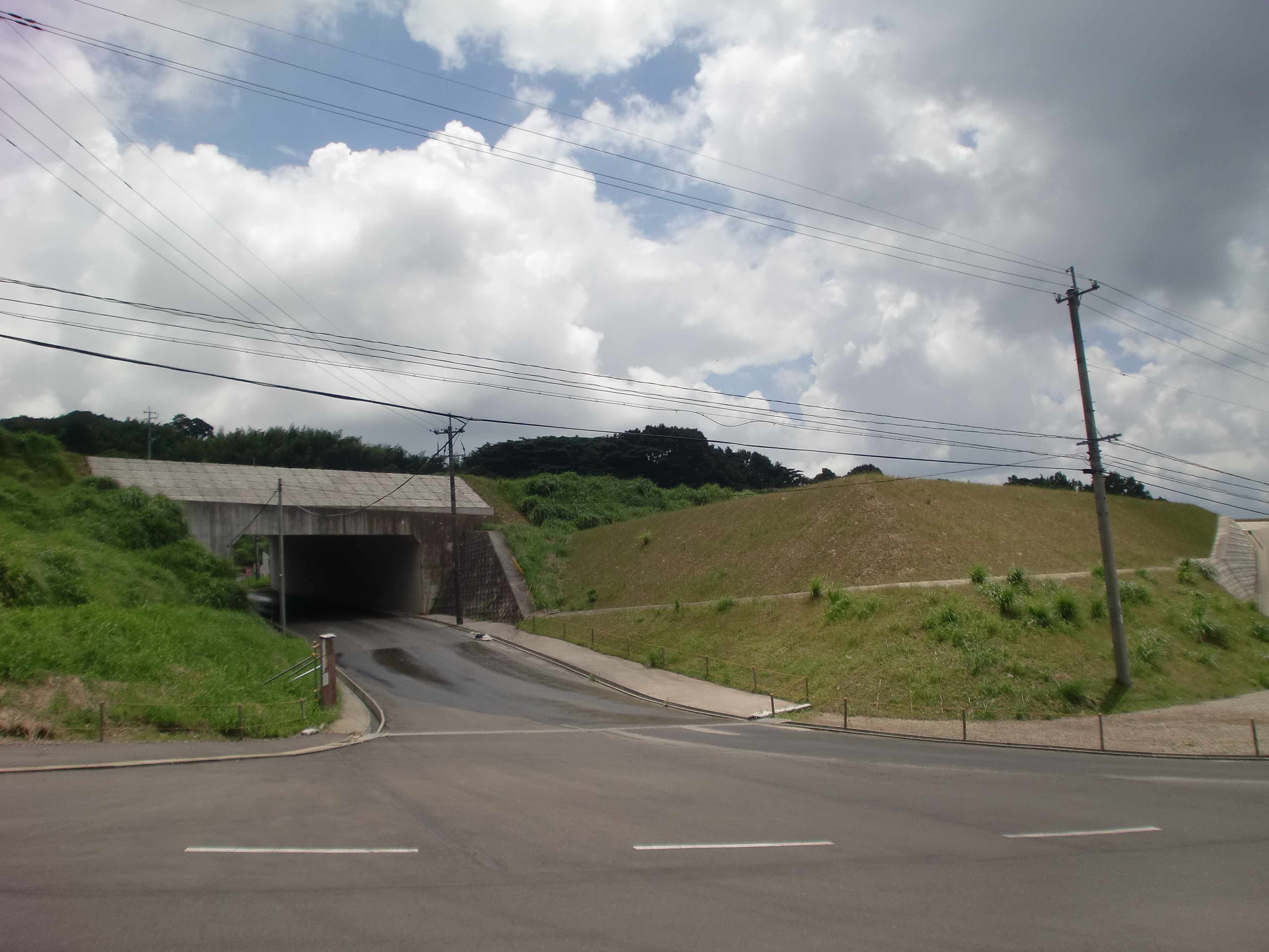 建設中のきららインターチェンジのランプ